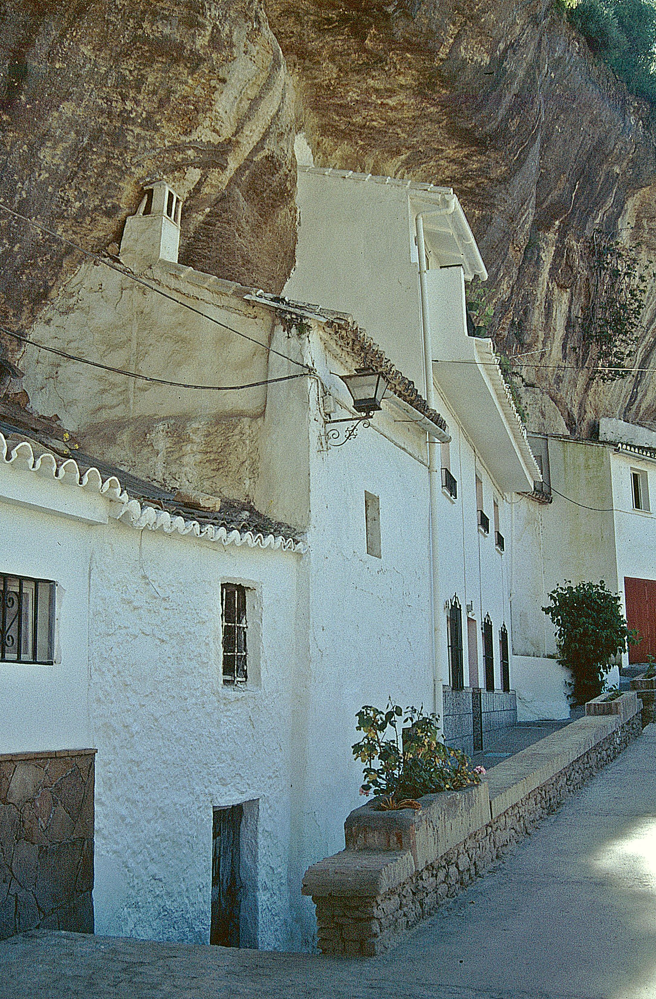 Setenil de las Bodegas